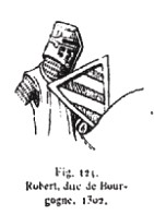 Robert II de Bourgogne